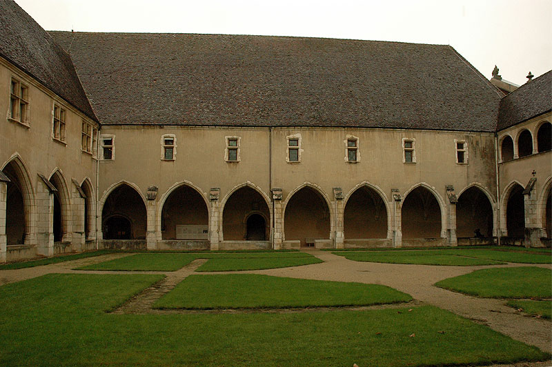 Monestir reial de Brou. Segon claustre. Bourg-en-Bresse, França